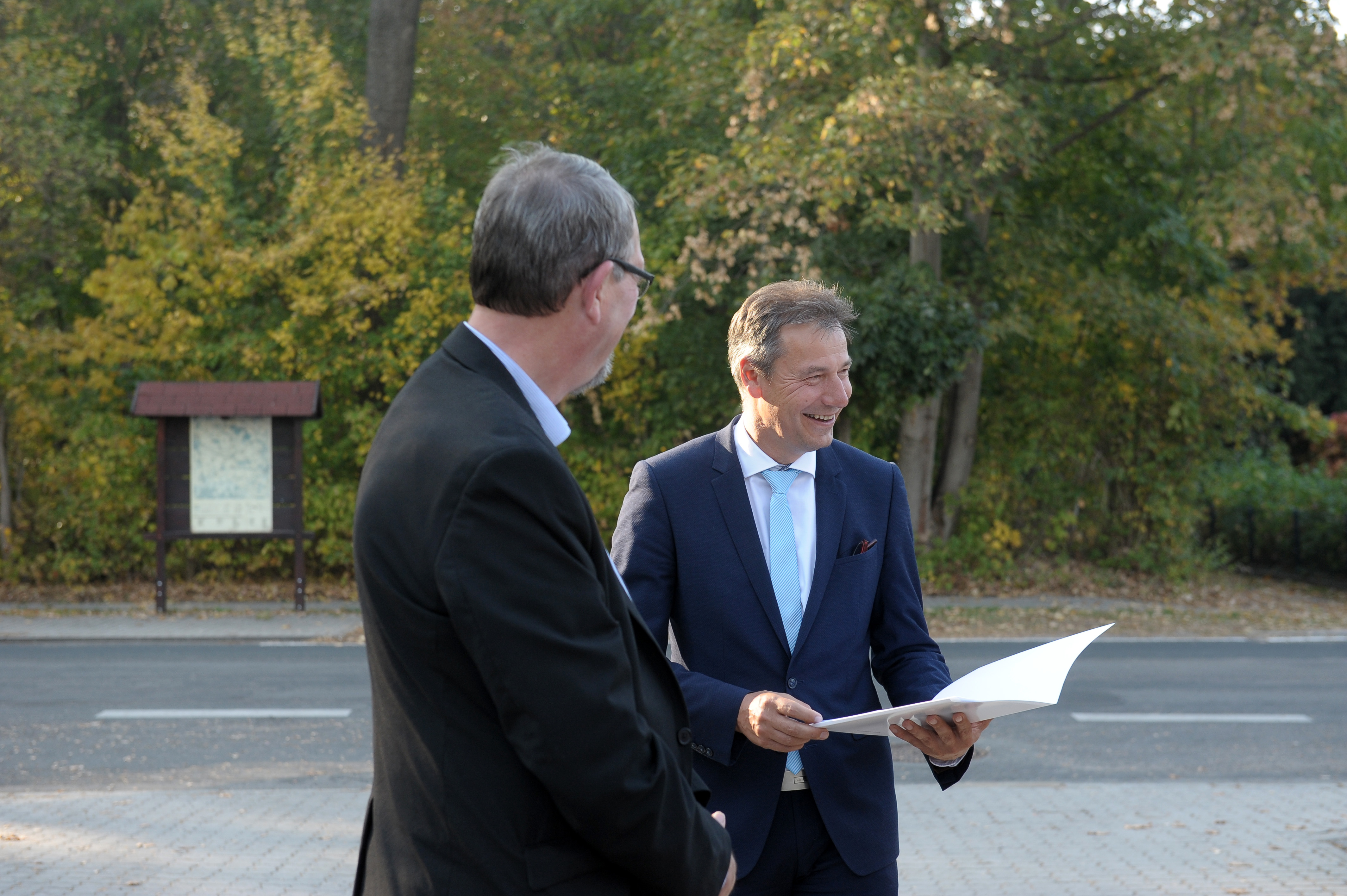 Nordsachsens Landrat Kai Emanuel bei der Fördermittelbescheidübergabe in Hohenroda.